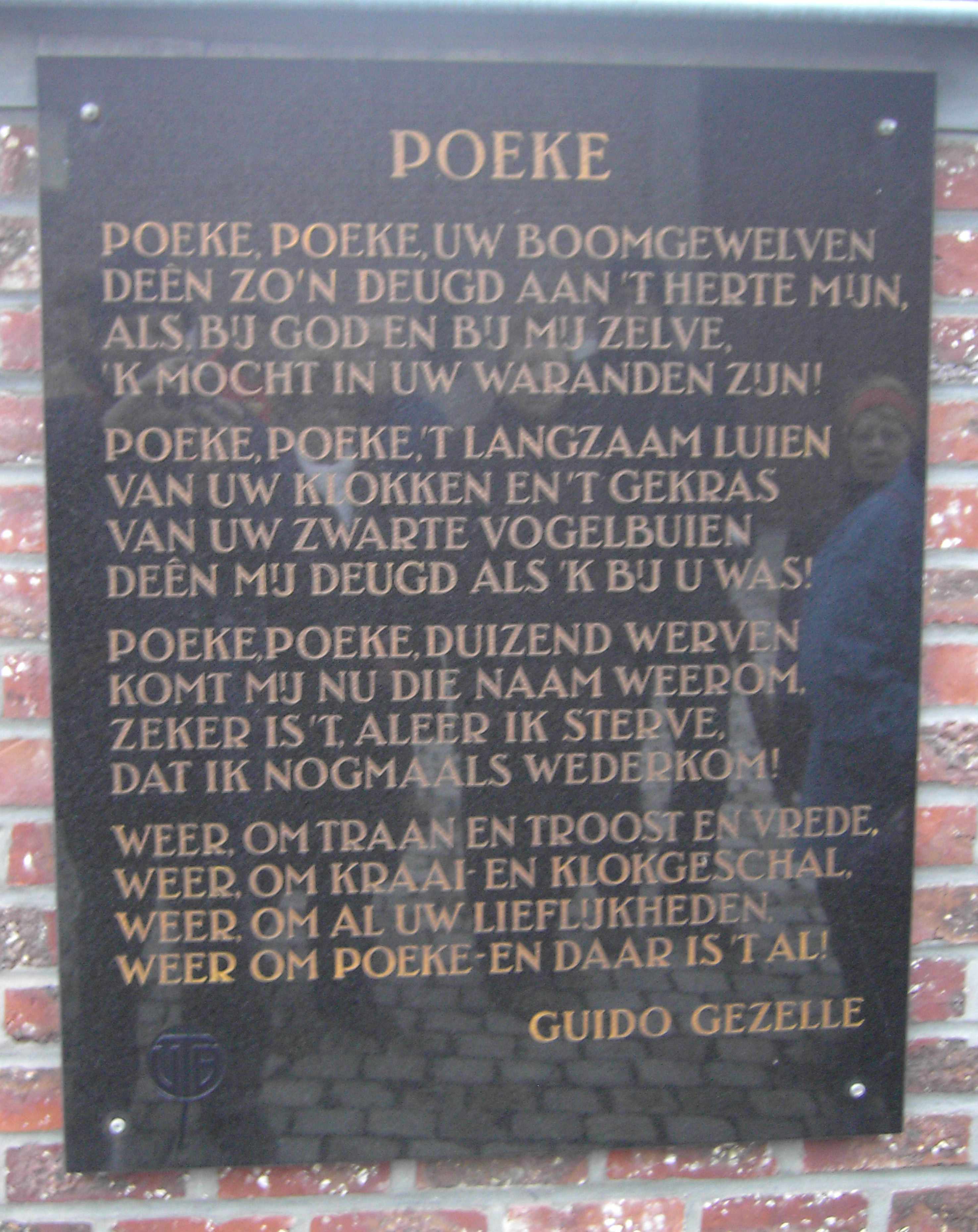 Poeke - Aalter - Kerkplein - Gedicht van Guido Gezelle